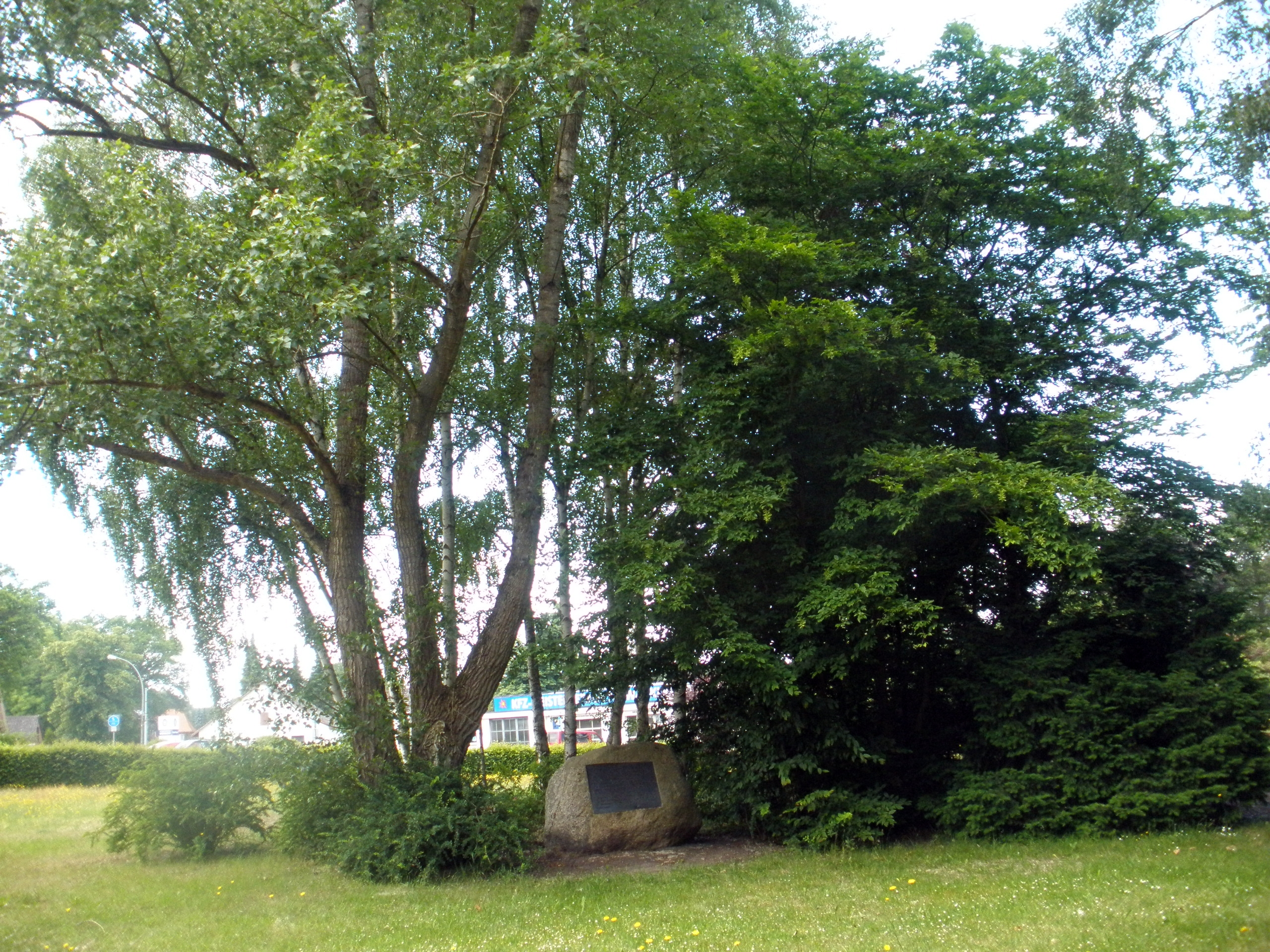 Gedenkstätte für das KZ Außenlager Alt-Garbe